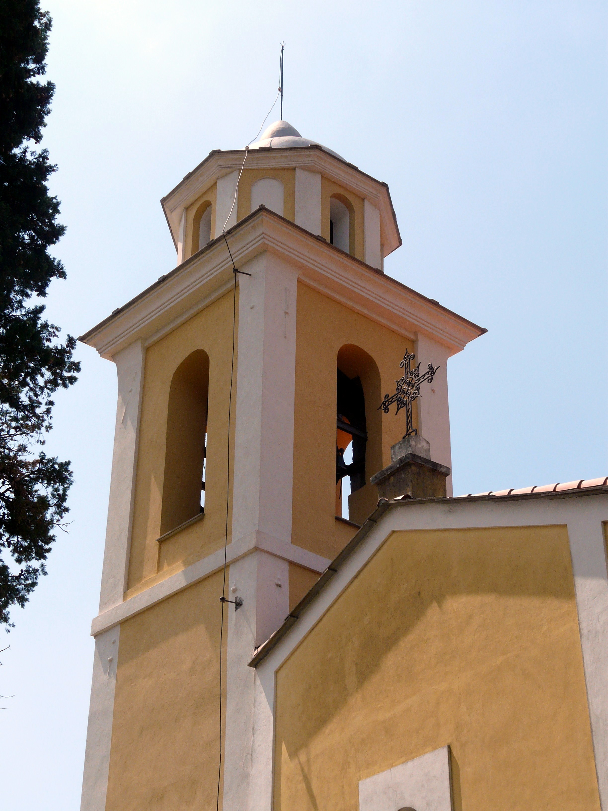 Chiesa di San Giovanni Battista, Stadomelli, Rocchetta di Vara, Liguria, Italia